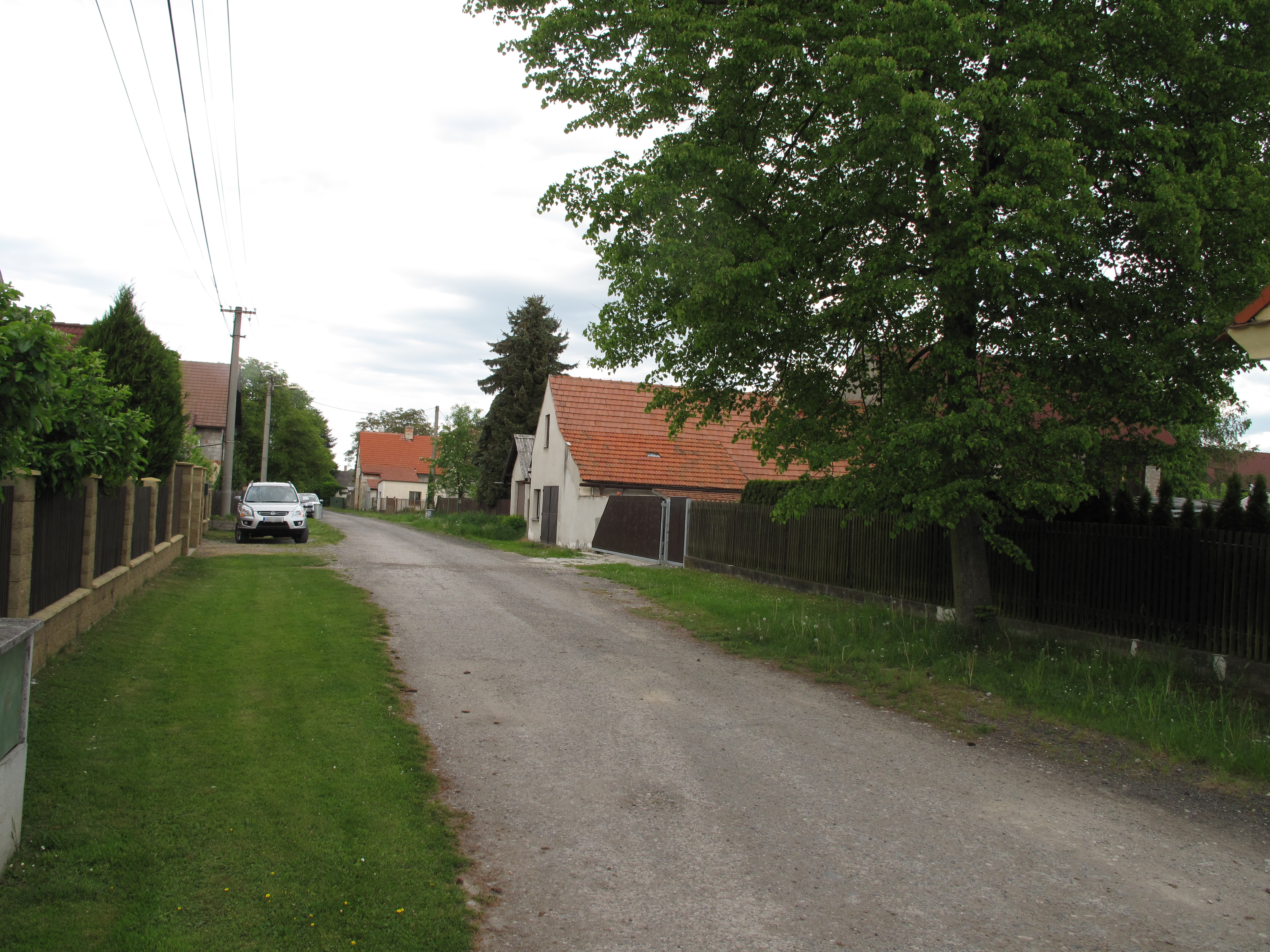 Cesta ve Vižině. Okres Beroun, Česká republika.